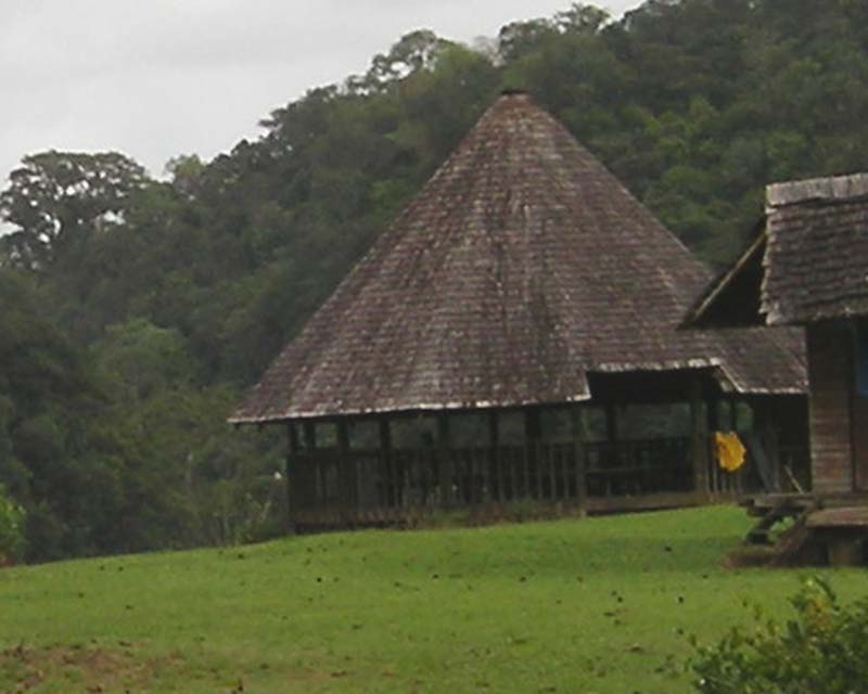 Un carbet de Guyane (2006) Région de Régina